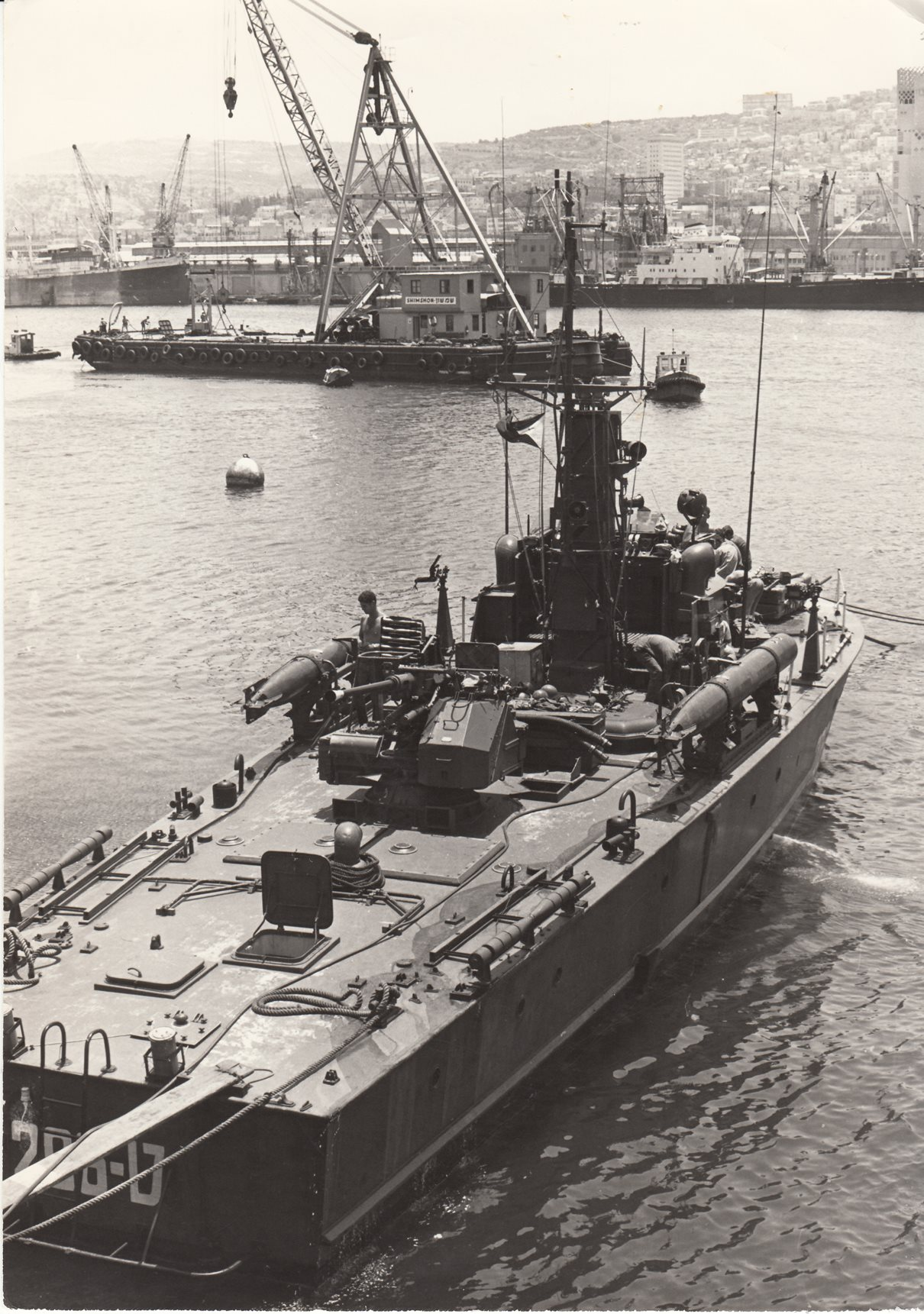 טרפדת ט-206 בעגינה ליד שובר הגלים בנמל חיפה חמושה בטורפדות.